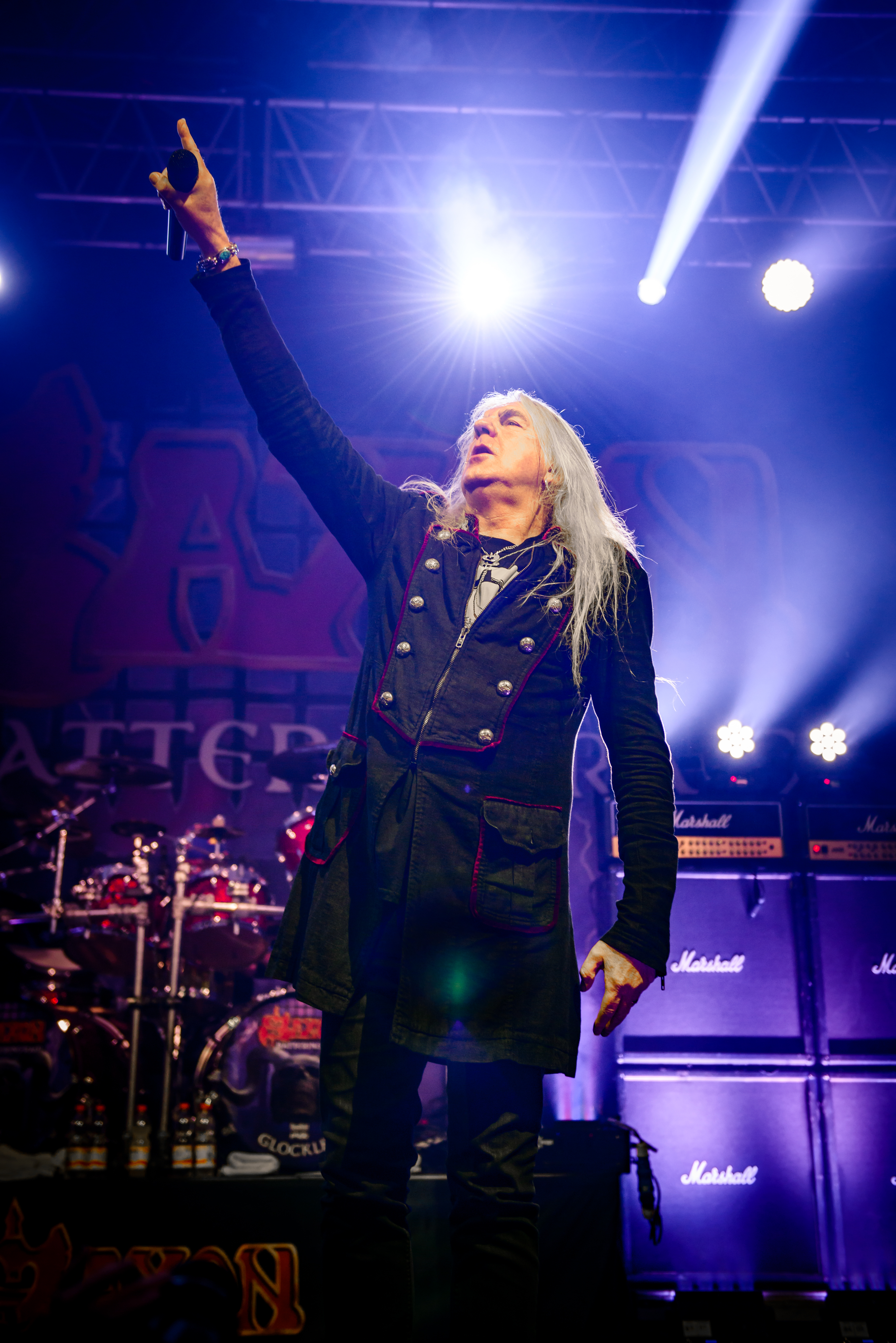 'Ruhrpott Metal Meeting 2016; Oberhausen Turbinenhalle': 'Saxon'